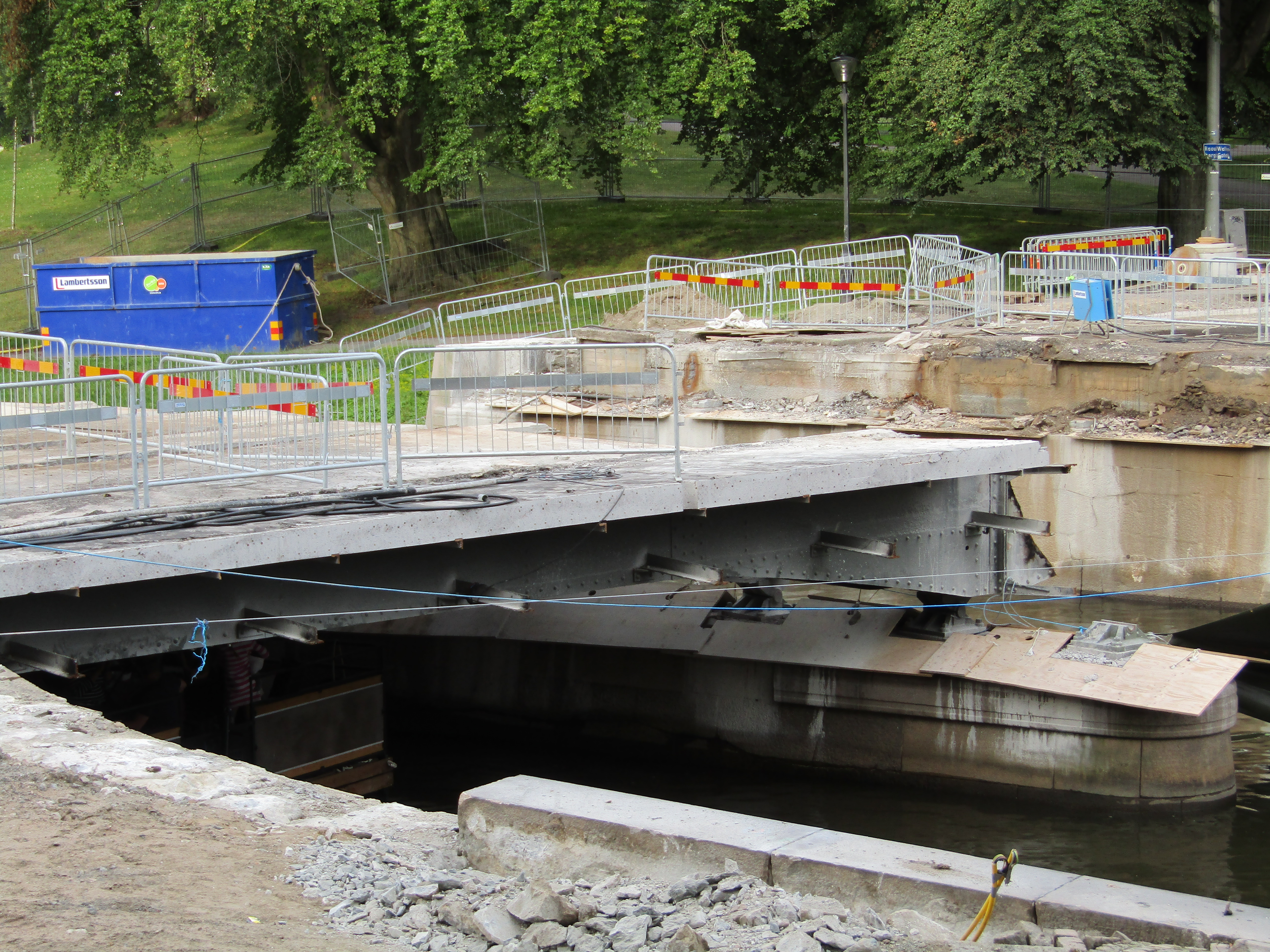 Pågående renovering av Vasabron i Göteborg, den 1 augusti 2017. Brons mittdel är riven.